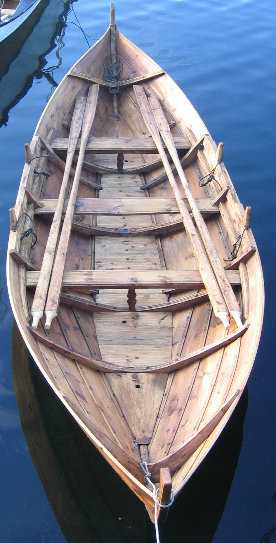 Snedbetna sunnmørsfæring fotografert under båtstemne Sunnmøre Museum 2005